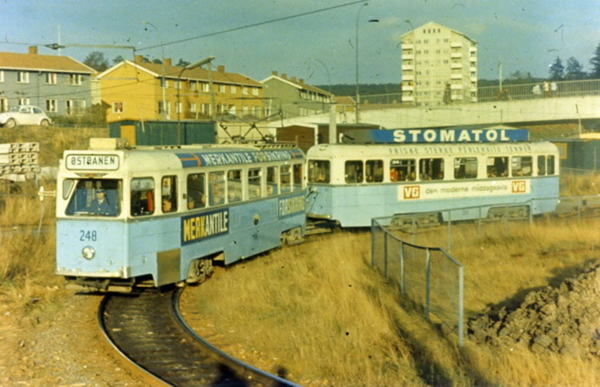 Oslo Sporveier. Høka-vogn med tilhenger, vogn 248 til Østbanen ved Bøler. Fra 1960-tallet.